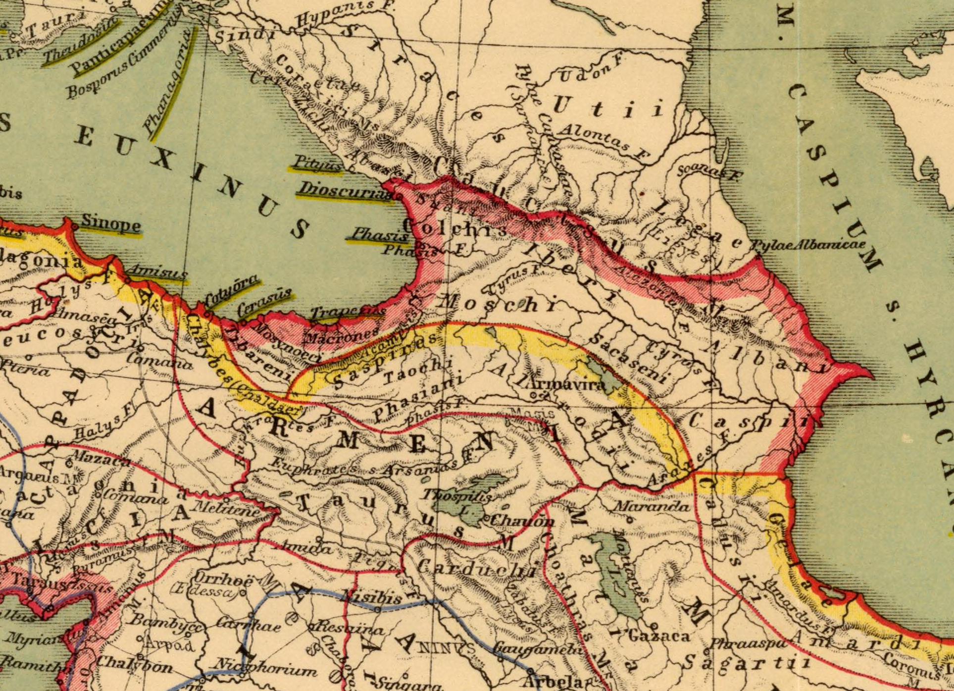 Imperia Persarum et Macedonum. (with) Regna Diadochorum medio IIIo. a. Chr. saeculo. (with) Regna Graecorum IIo a. Chr. saeculo. Auctore Henrico Kiepert Berolinensi. Geographische Verlagshandlung Dietrich Reimer (Ernst Vohsen) Berlin, Wilhemlstr. 29. (1903)